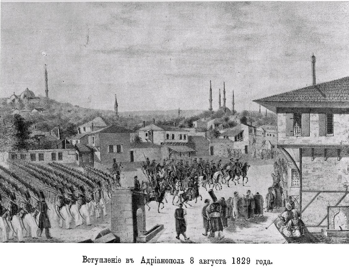 Русские войска вступают в Адрианаполь. 1829 год